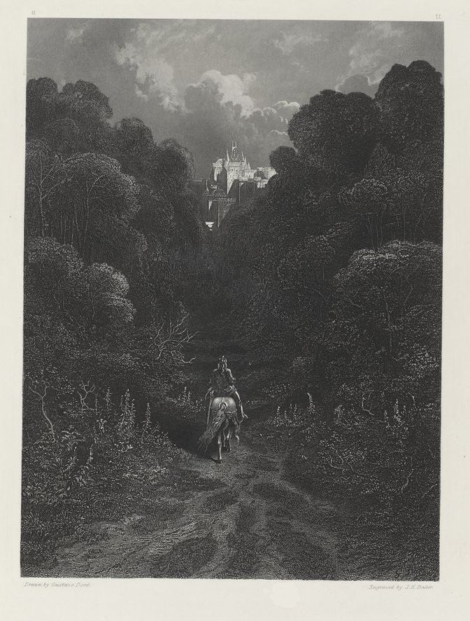 Jusqu'à ce qu'il suivit une ornière faiblement ombragée, qui, comme une chaîne, allait parmi les vallées aboutir au château d'Astolat. Là, il vit à l'ouest une lumière qui en annonçait au loin les tours sur une hauteur.